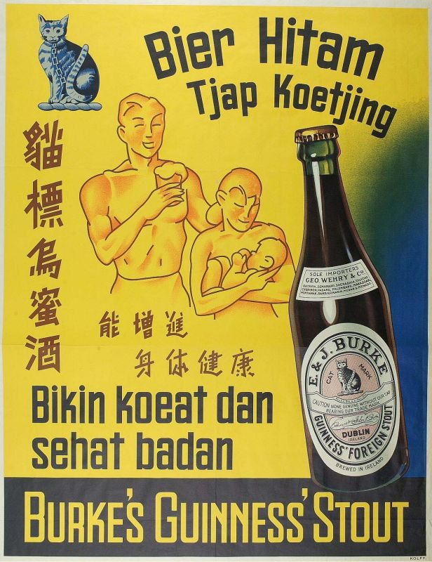 Affiche. Reclameaffiche voor het Ierse bier 'Burke's Guinness Stout'. Tekst op het affiche: 'Bier Hitam Tjap Koetjing; Bikin Koeat dan Sehat Badan' (Donker Bier, Merk Kat, Geeft Kracht en Gezondheid). Daarnaast een Chinese tekst. In grote letters onderaan: Burke's Guinness Stout. Gedrukt bij Fa. Kolff in Batavia. De firmanaam staat rechtsonder.. Grote reclameaffiche voor het Ierse bier 'Burke's Guiness Stout'